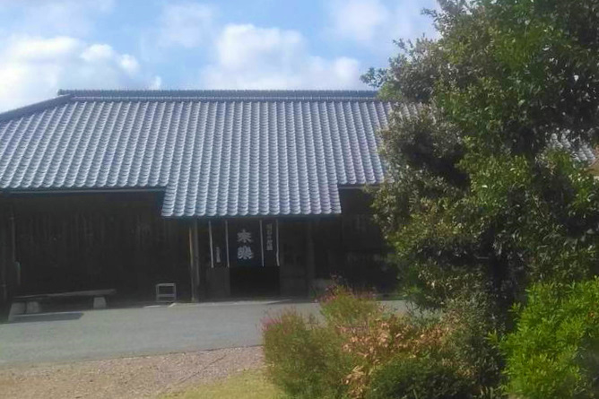 茨木酒造 正面